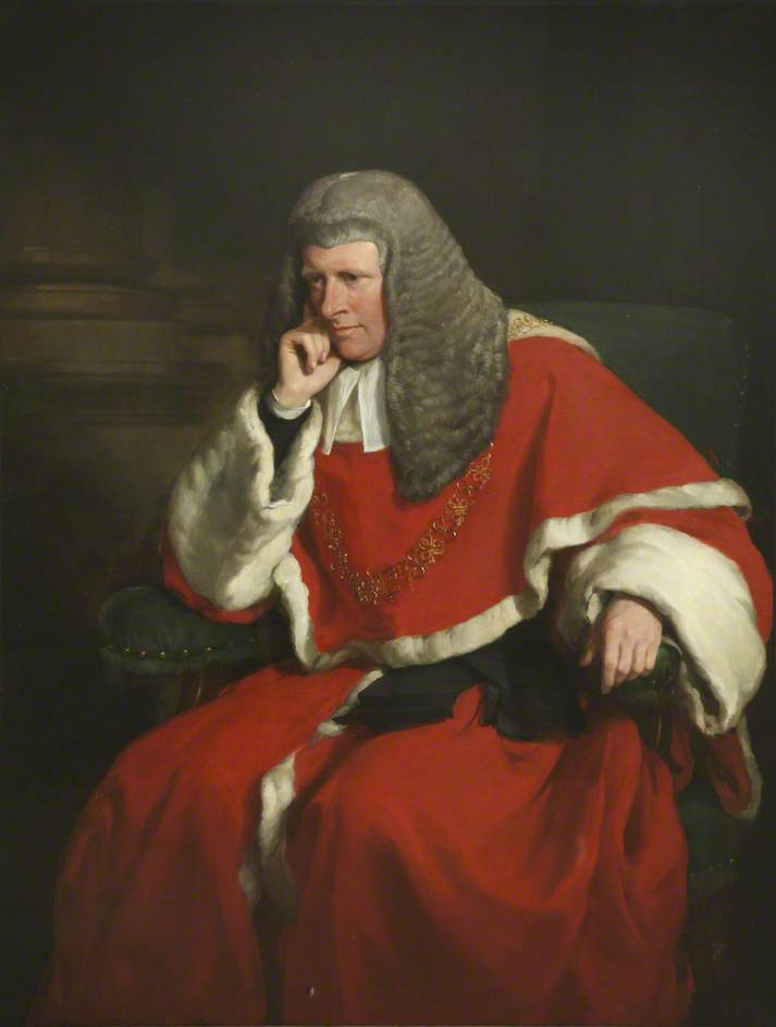 Sir William Erle (1793-1880)